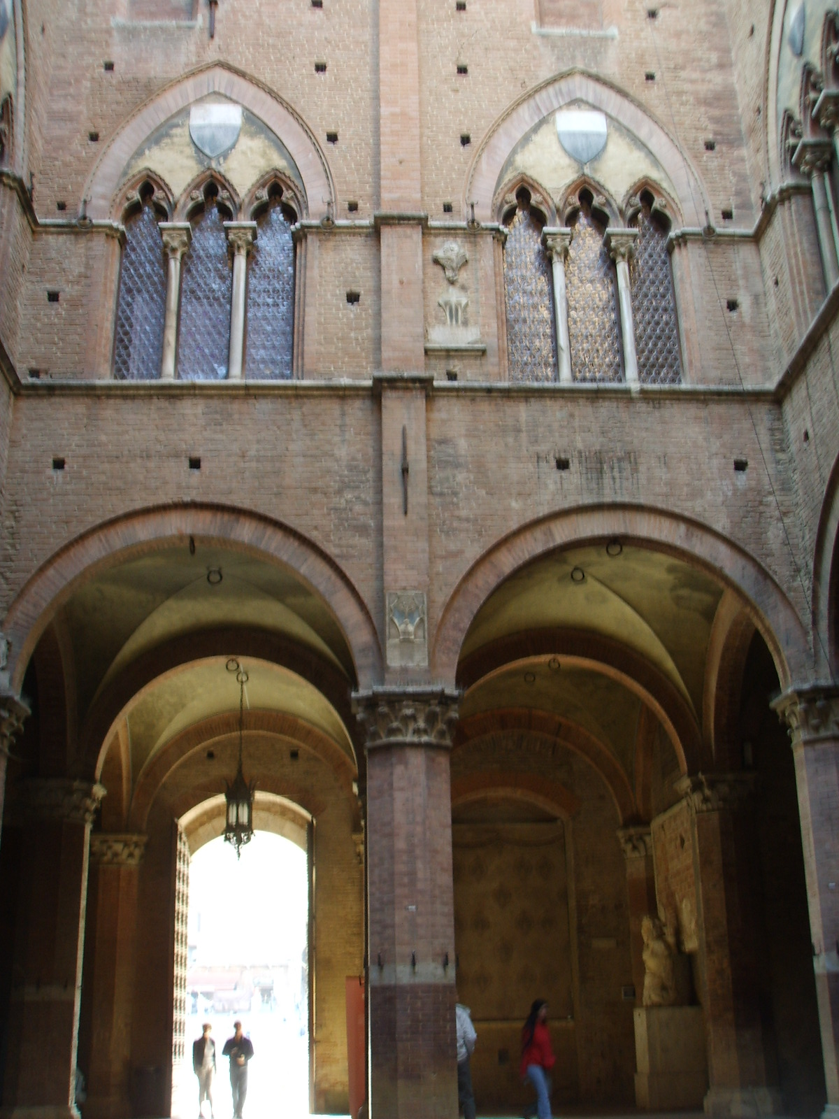 Palazzo Pubblico, courtyard (Cortile del Podestà), in Siena, Italy